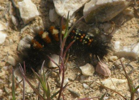 Saline di Trapani - Sicily